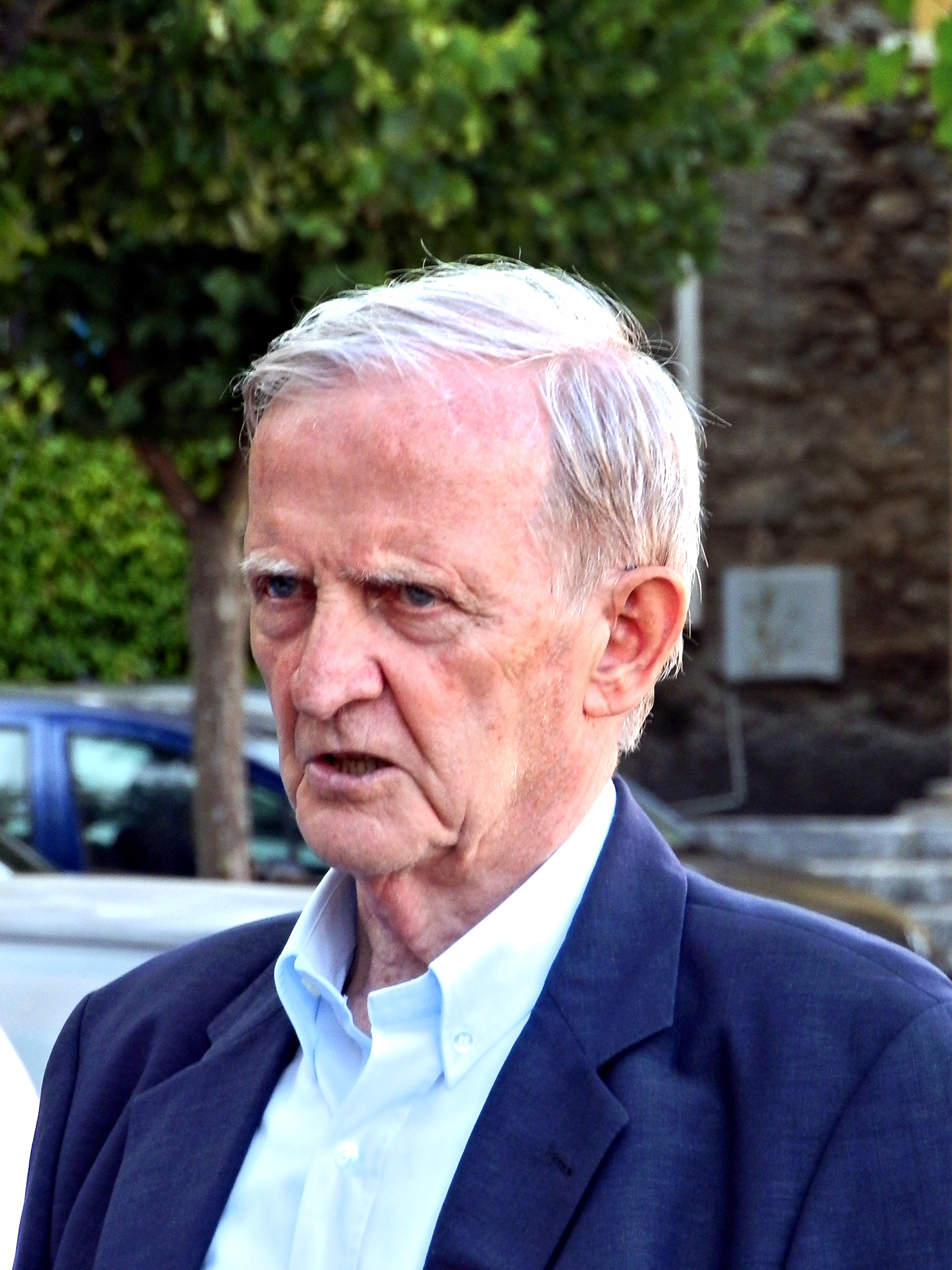 Docteur Edmond Simeoni, l'un des « pères » du nationalisme corse